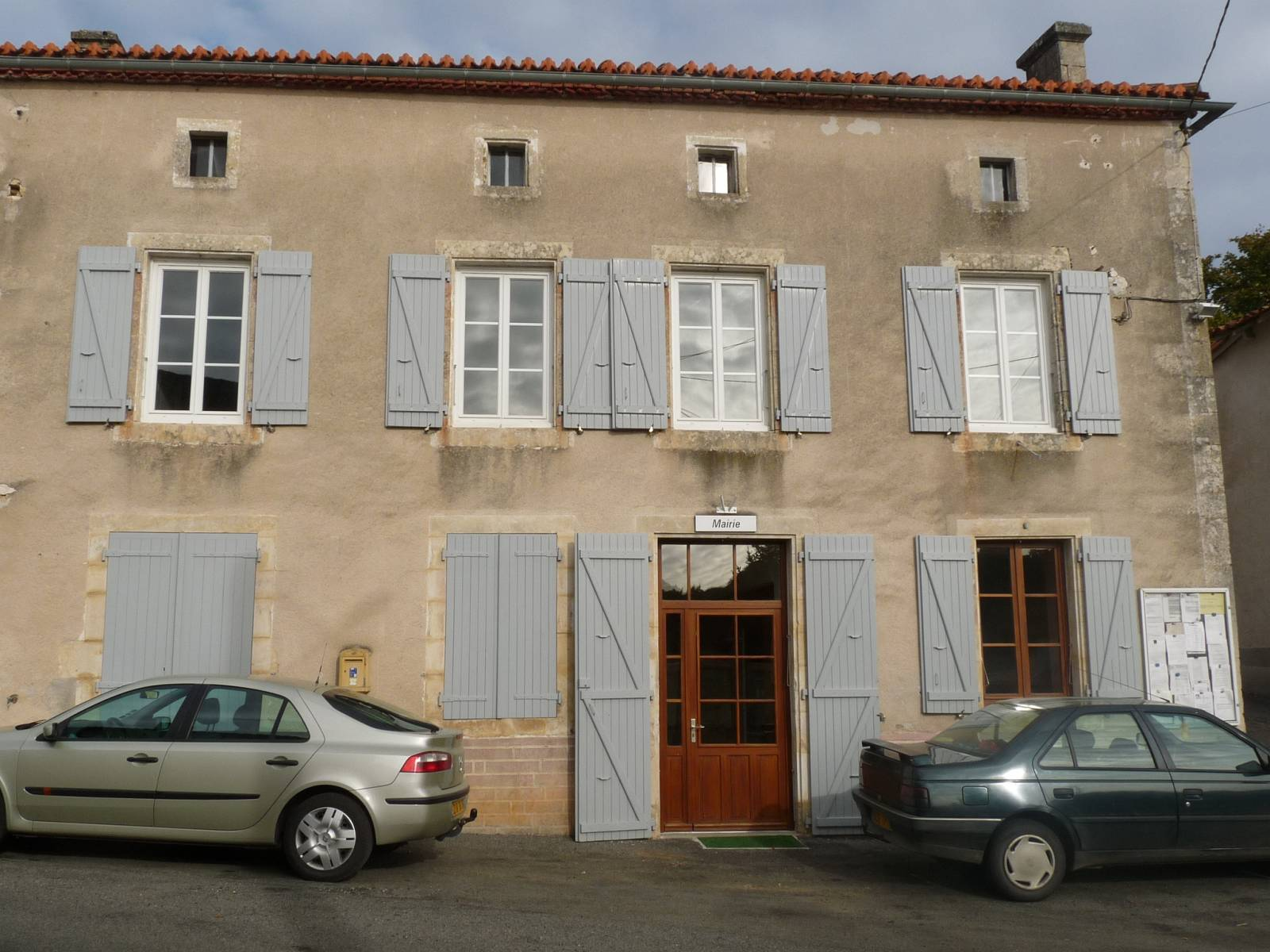 mairie de Parzac, Charente, France